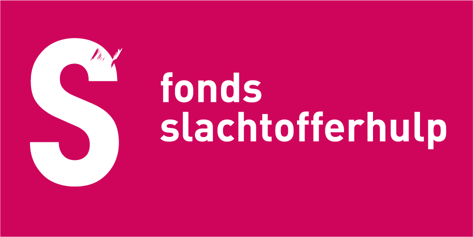 Het logo van Fonds Slachtofferhulp in de kleur ruby duidt aan dat het gaat om wetenschappelijk en maatschappelijk onderzoek, onderwijs, opleiding en trainingen.